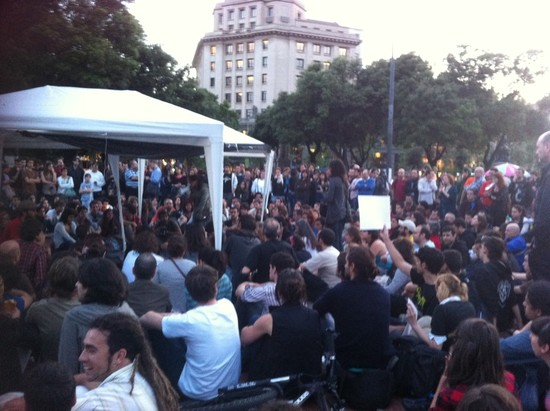 Acampada de Democracia Real Ya en Barcelona el 18 de mayo de 2011.